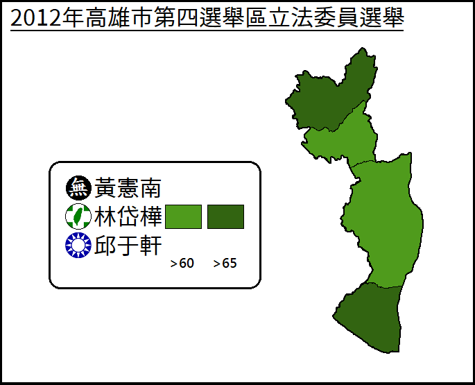 2012年高雄市第四選舉區立法委員選舉得票